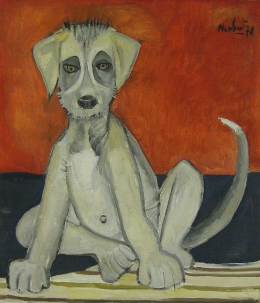 „Der kleine große Cormak“ von Hans Neubert (1978, Öl auf Leinwand, 74 x 65,5 cm)